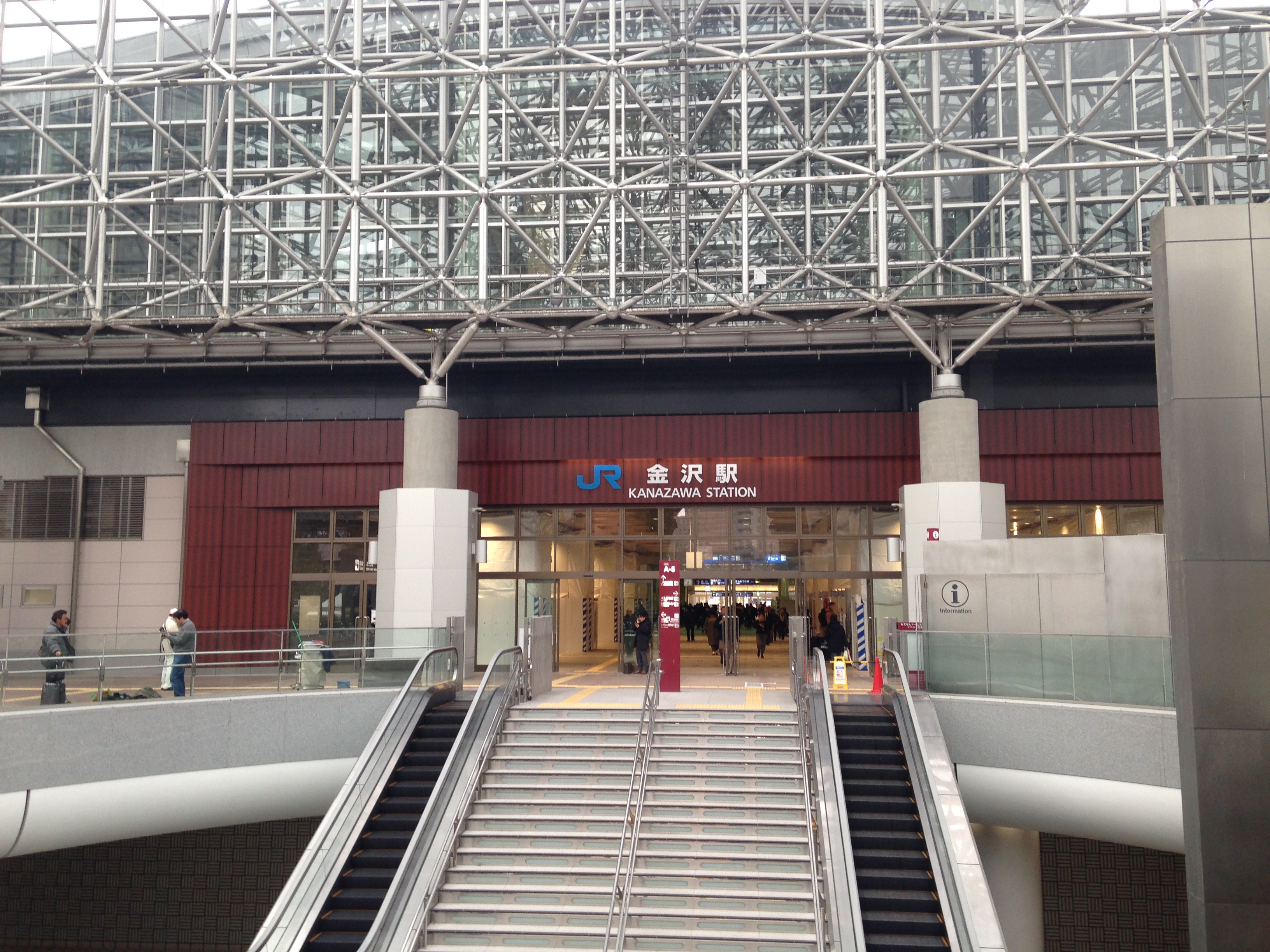 金沢駅東口